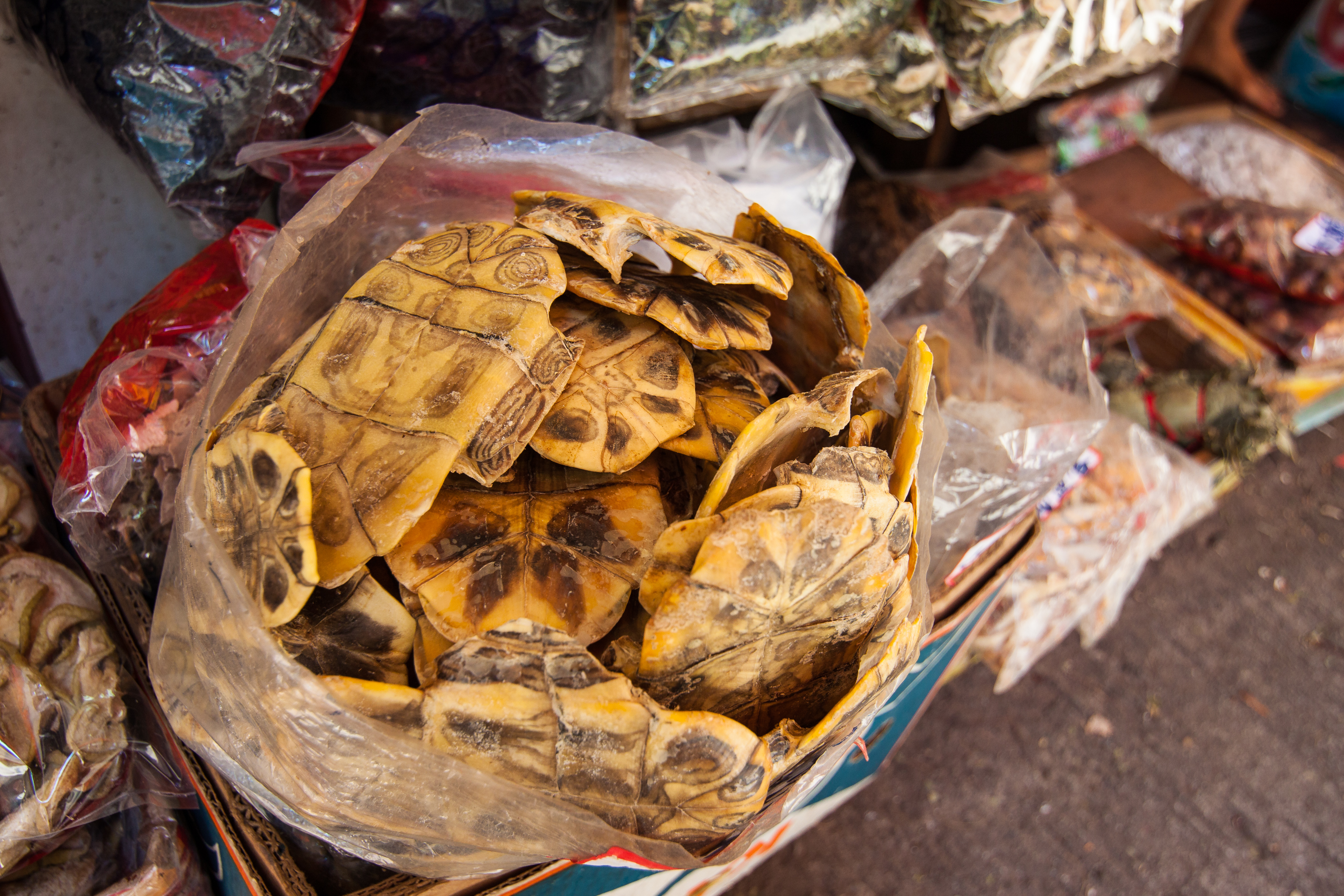 中文（香港）: 這是藥用龜板。圖像攝於香港上環的海味舖。